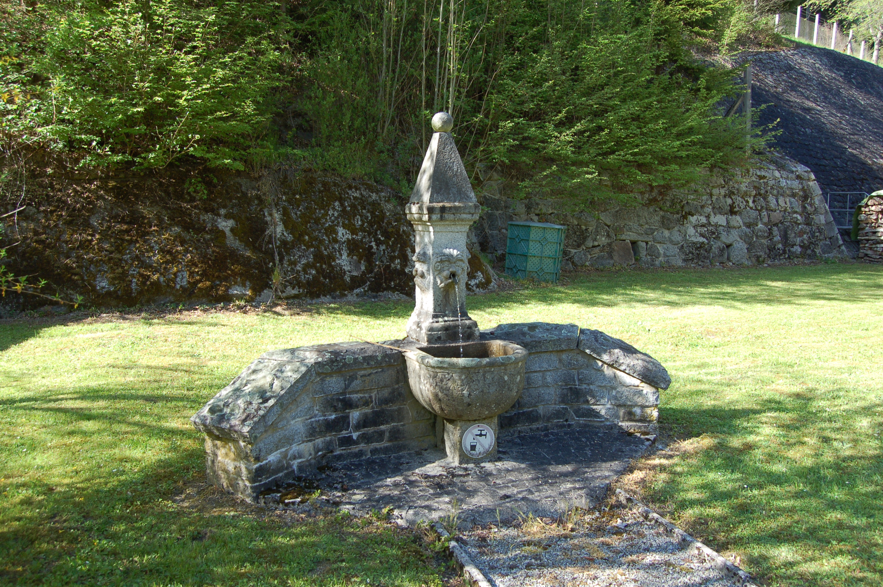 Der Brunnen in Partenstein besteht aus einem Muschelbecken aus dem 18. Jahrhundert und einem Pfeiler aus der Zeit um 1600 mit drei Löwenköpfen und kugelbekröntem Pyramidenaufsatz. Der Brunnen befand sich ehemals in Schloss Langhalsen.